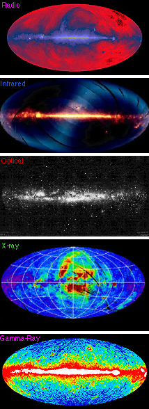 നാസ വെബ്ബ് സൈറ്റിൽ നിന്നുള്ള ചിത്രം